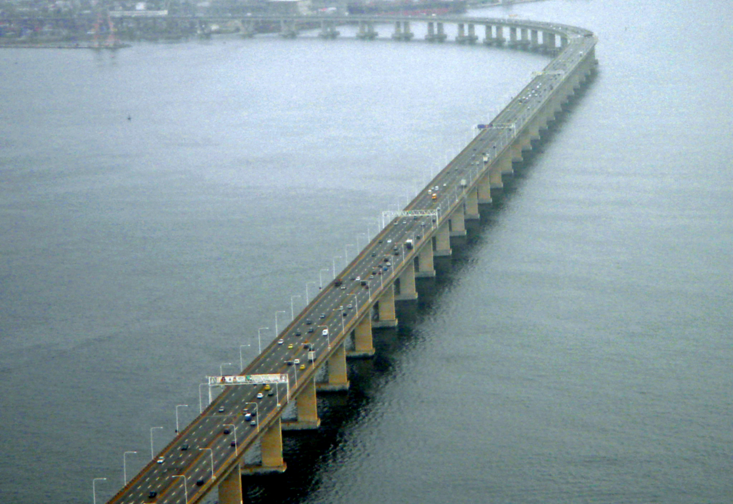 Ponte Rio-Niteroi